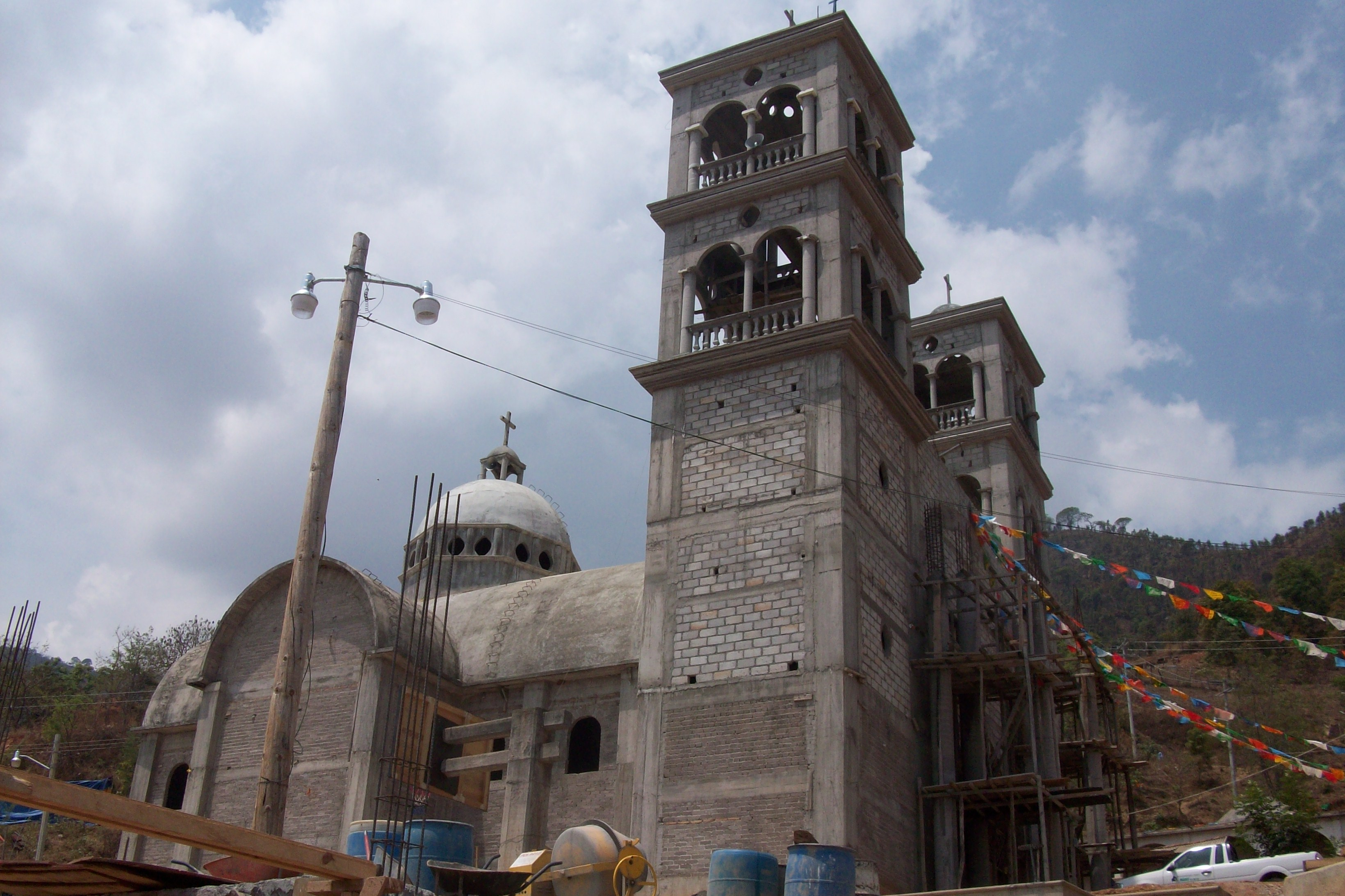 Iglesia de San Sebastian, Juanacatlan. Metlatonoc, Gro.